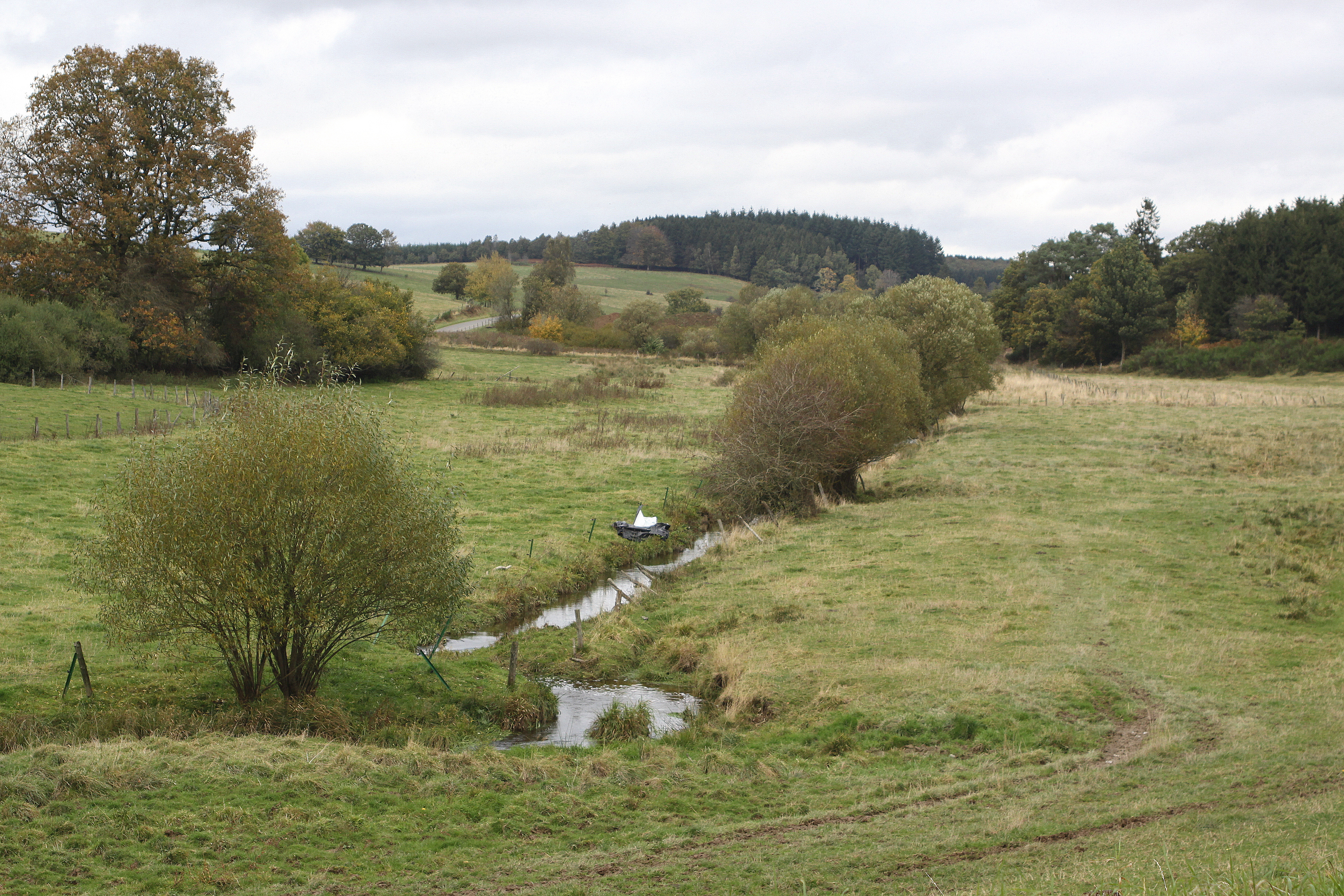 Mandebras bei Thibessar